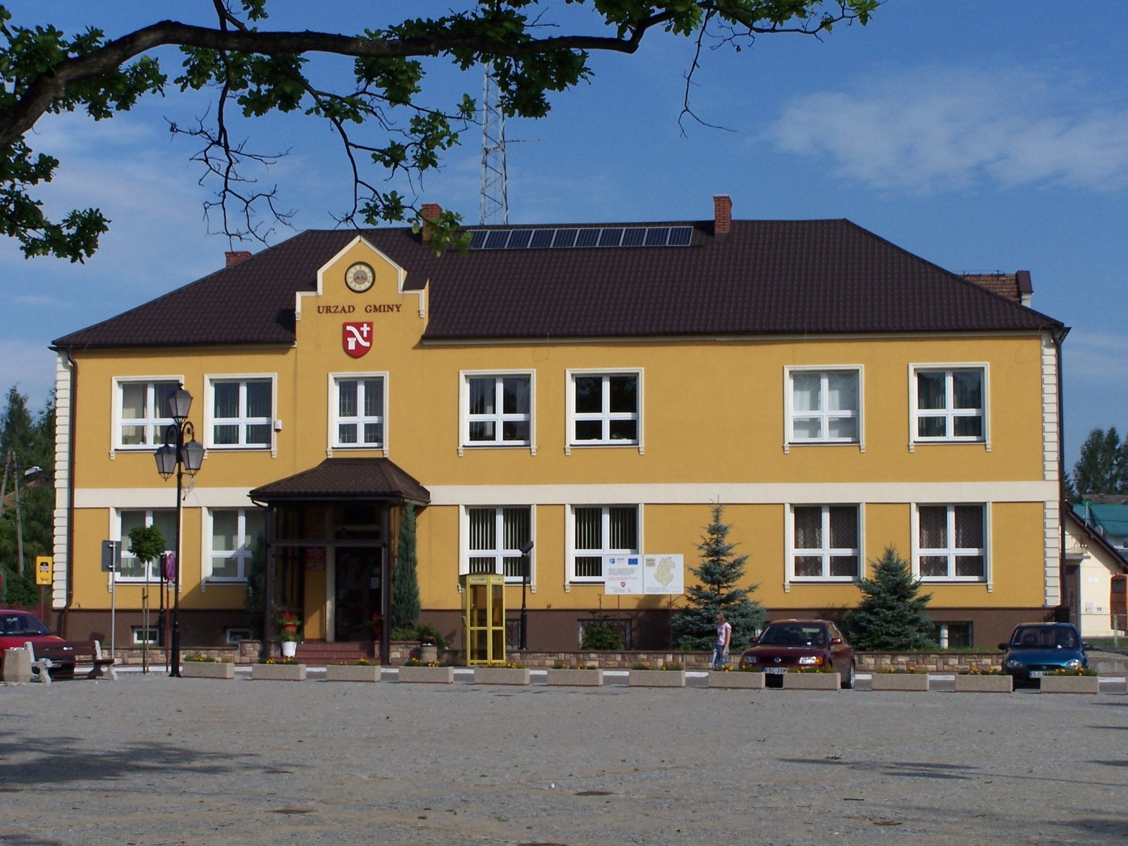 Łapanów. Urząd Gminy